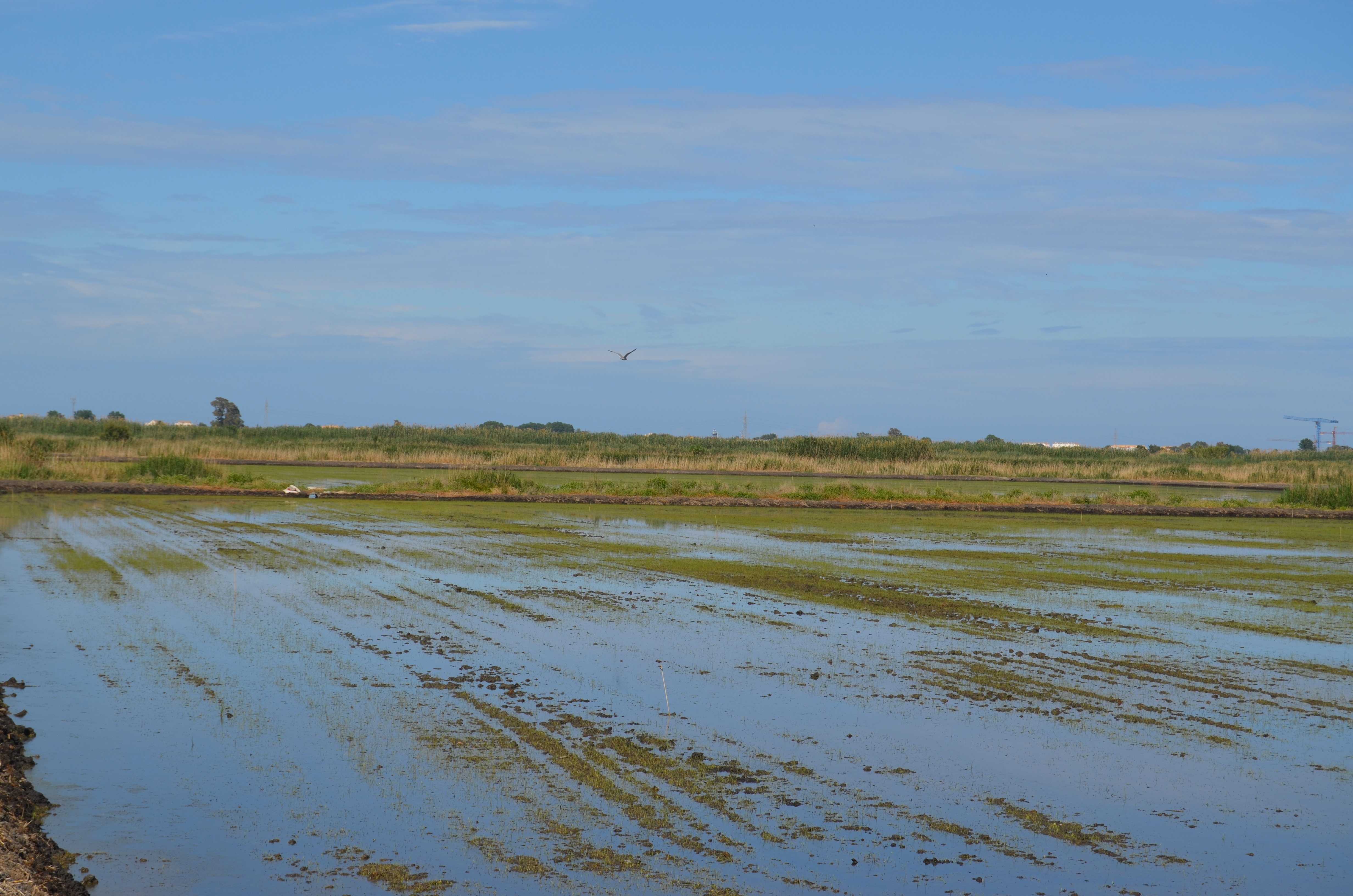 Parque natural del Marjal de Pego-Oliva This is a photography of a Special Area of Conservation in Spain with the ID: ES0000147. Natura2000 entry, EEA entry